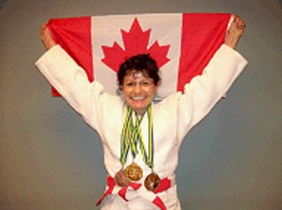 Mara Markovic Siladji